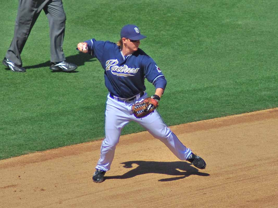 Khalil Greene